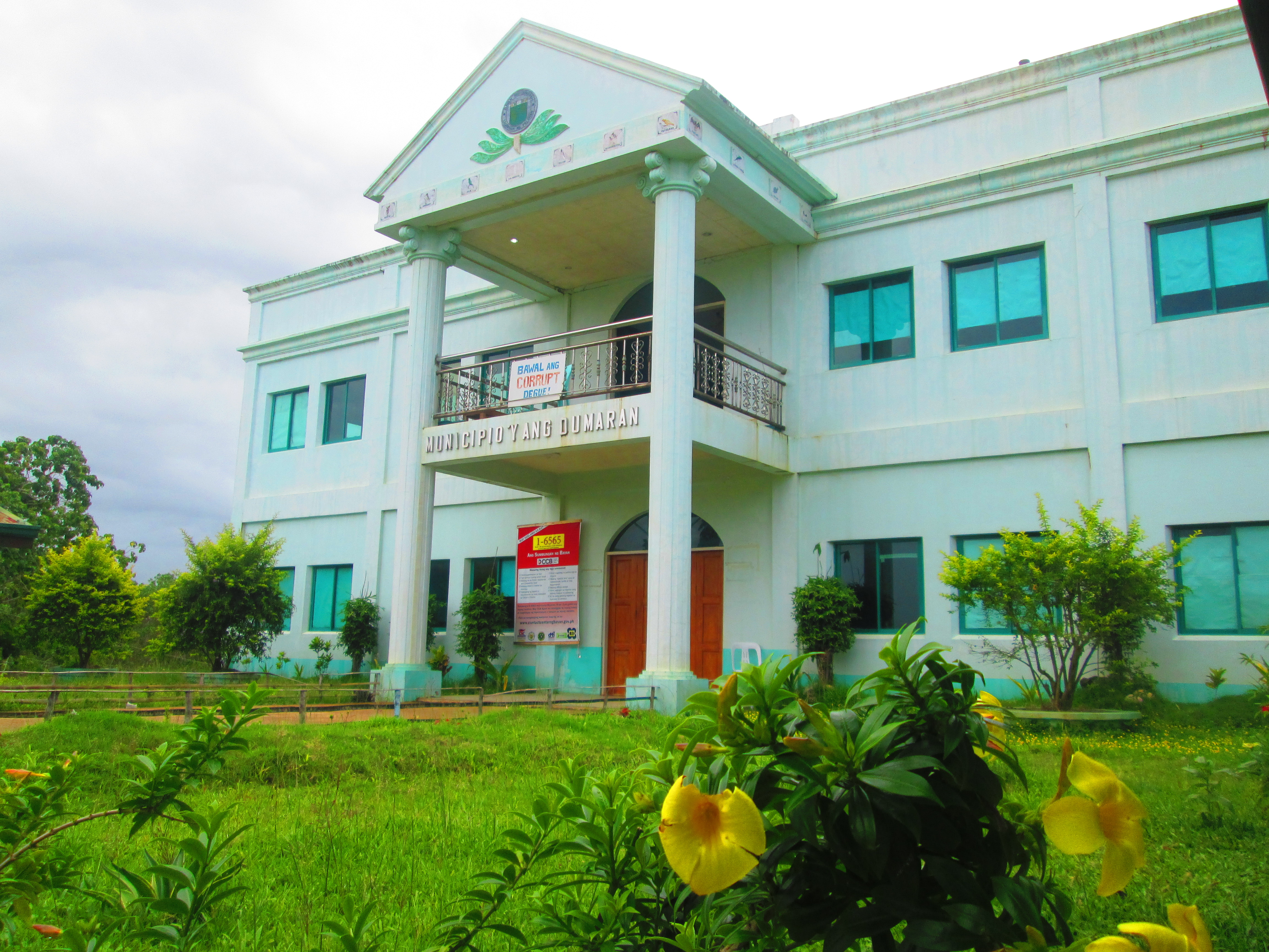 Municipal Hall-Dumaran, Palawan